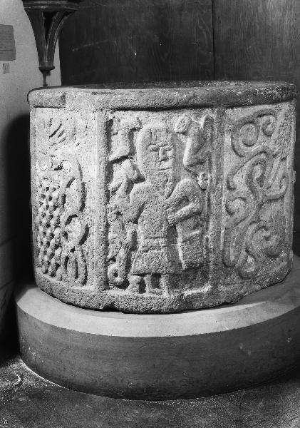 Dopfunt, 1100-talet, cuppan. Kategori: (04) DopfuntarDopfunt, 1100-talet, cuppan.